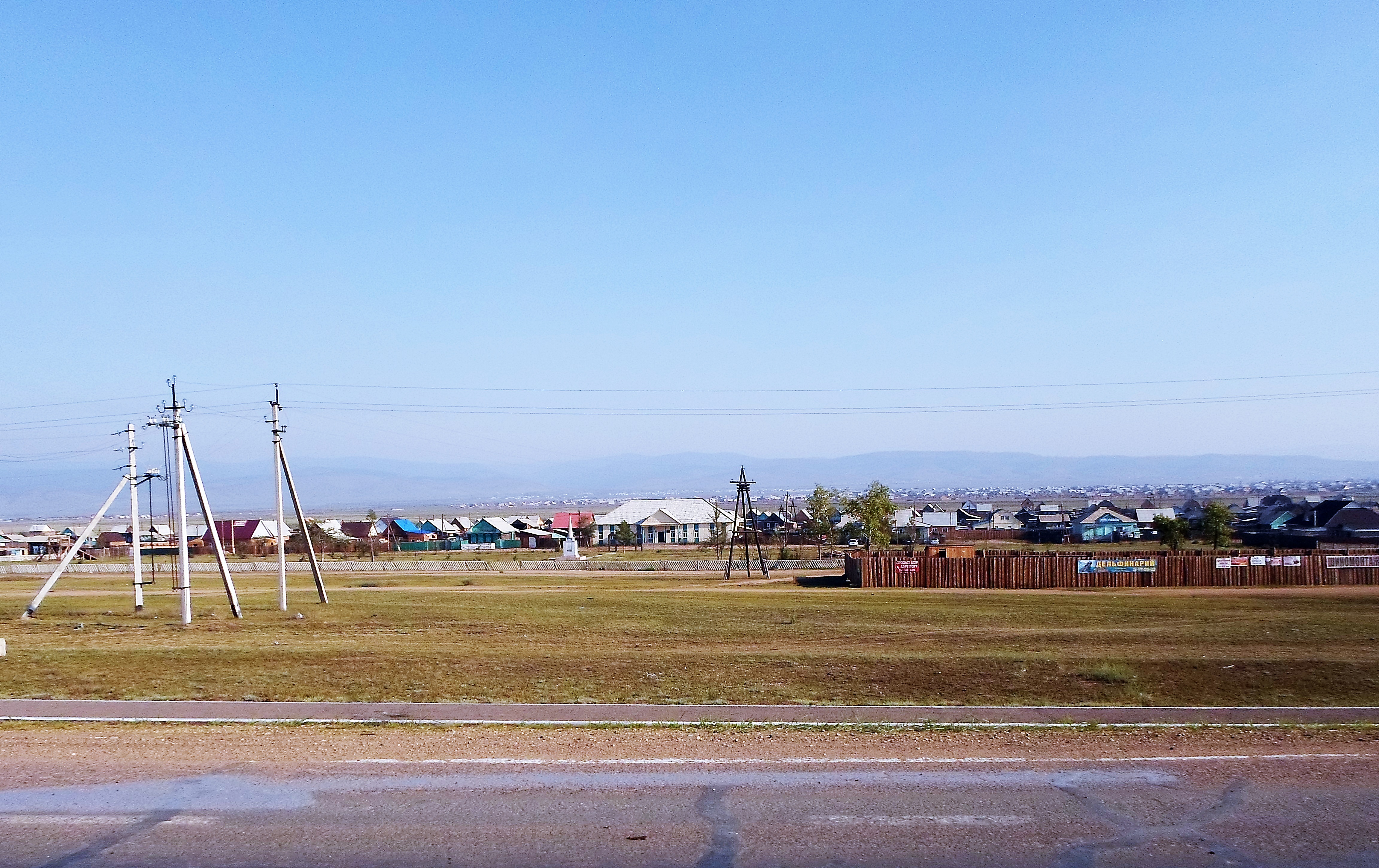 Центр села Нижняя Иволга. Иволгинский район Бурятии. Вид с Кяхтинского тракта.